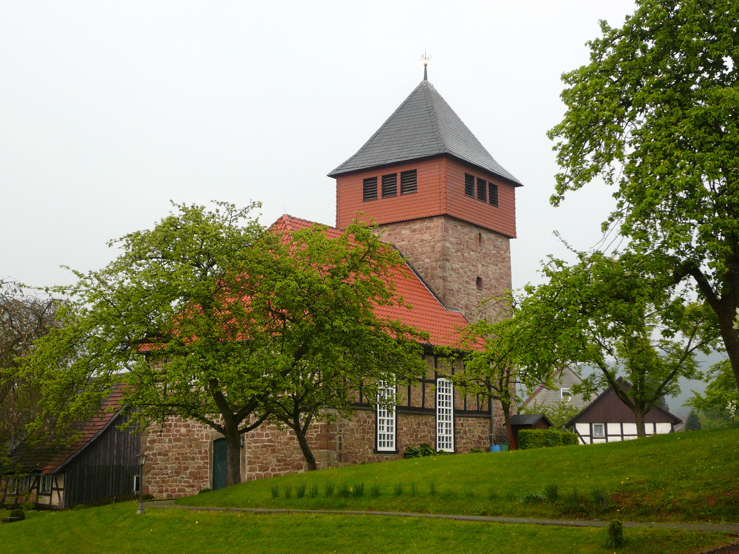 mittelalterliche Dorfkirche in Uslar-Schlarpe, Blick von Südwesten